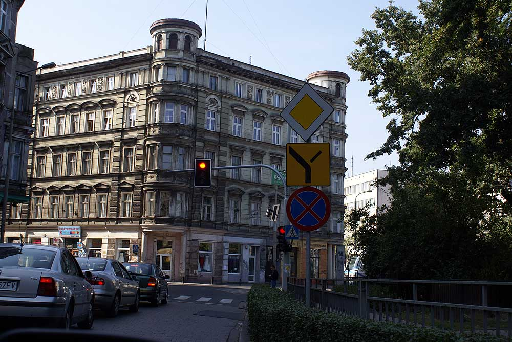 Rejon placu św. Macieja (d. pl. Engelsa) ograniczony ul. Rydygiera, Drobnera, Jedności Narodowej, Ołbińską, pl. Powstańców Wielkopolskich i pl. Staszica. pl. św. Macieja, Miasto Wrocław - Śródmieście